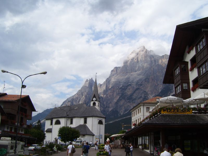 San Vito di Cadore - Chiesa